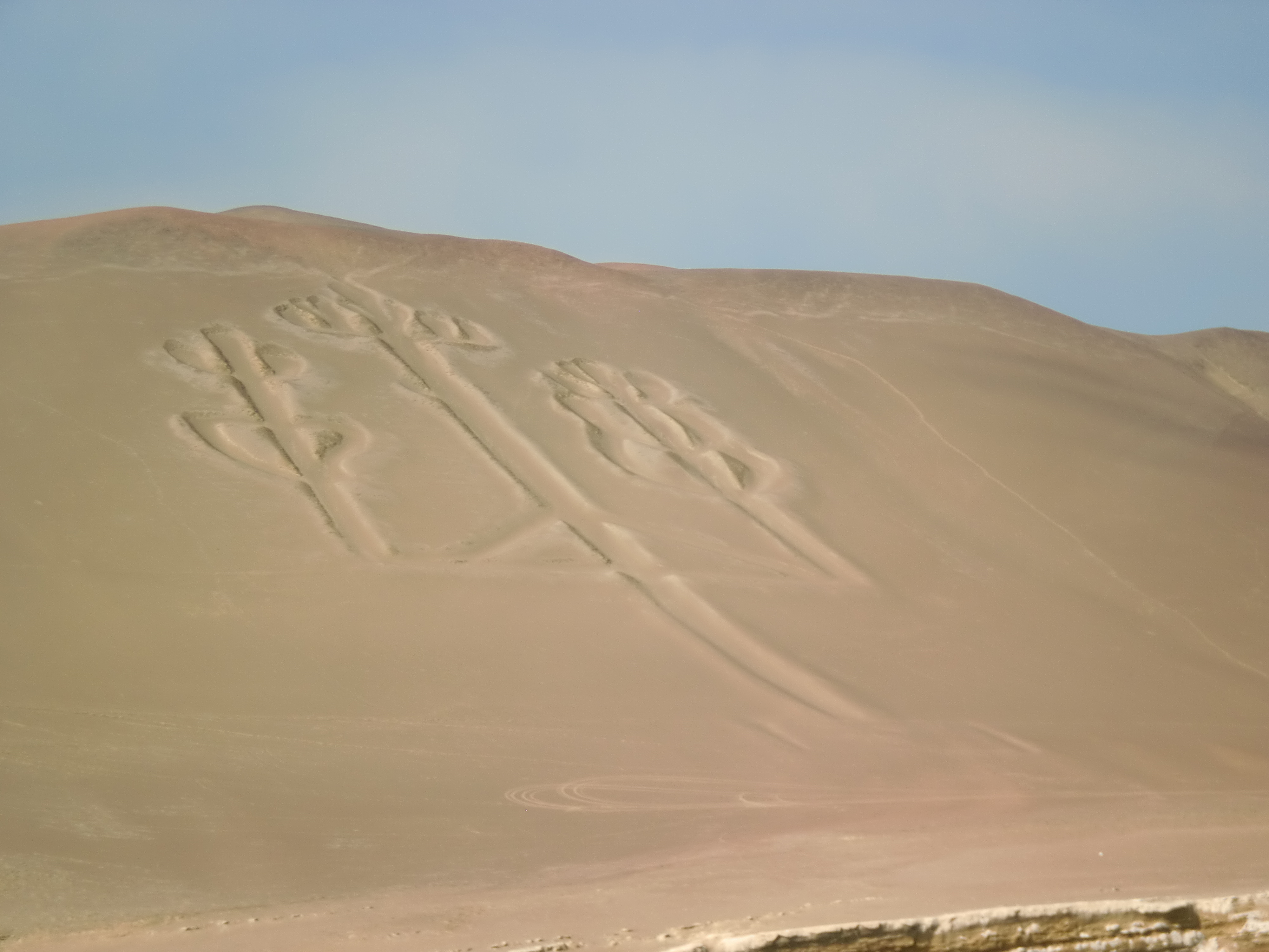 ISLAS BALLESTAS